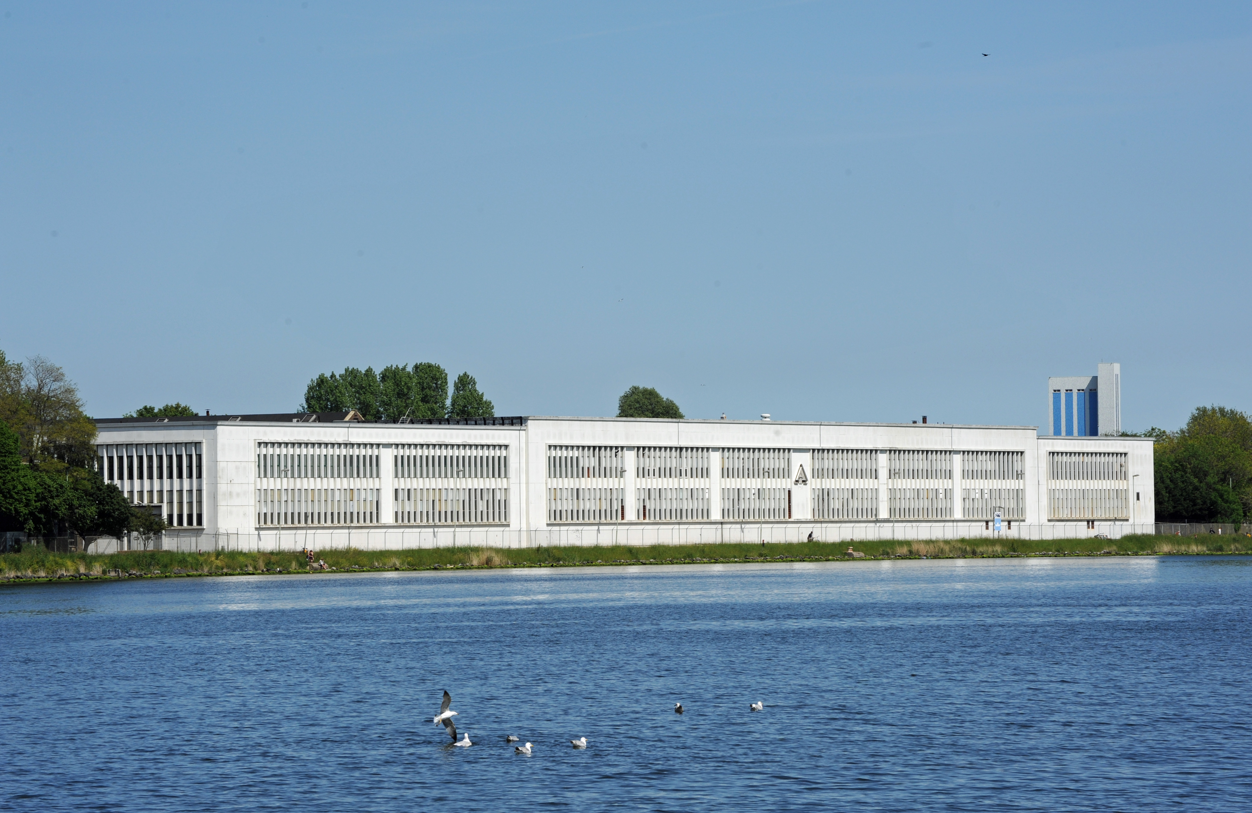 Hembrugterrein, gebouw 429 Eurometaal, AI, .50, laboratoria